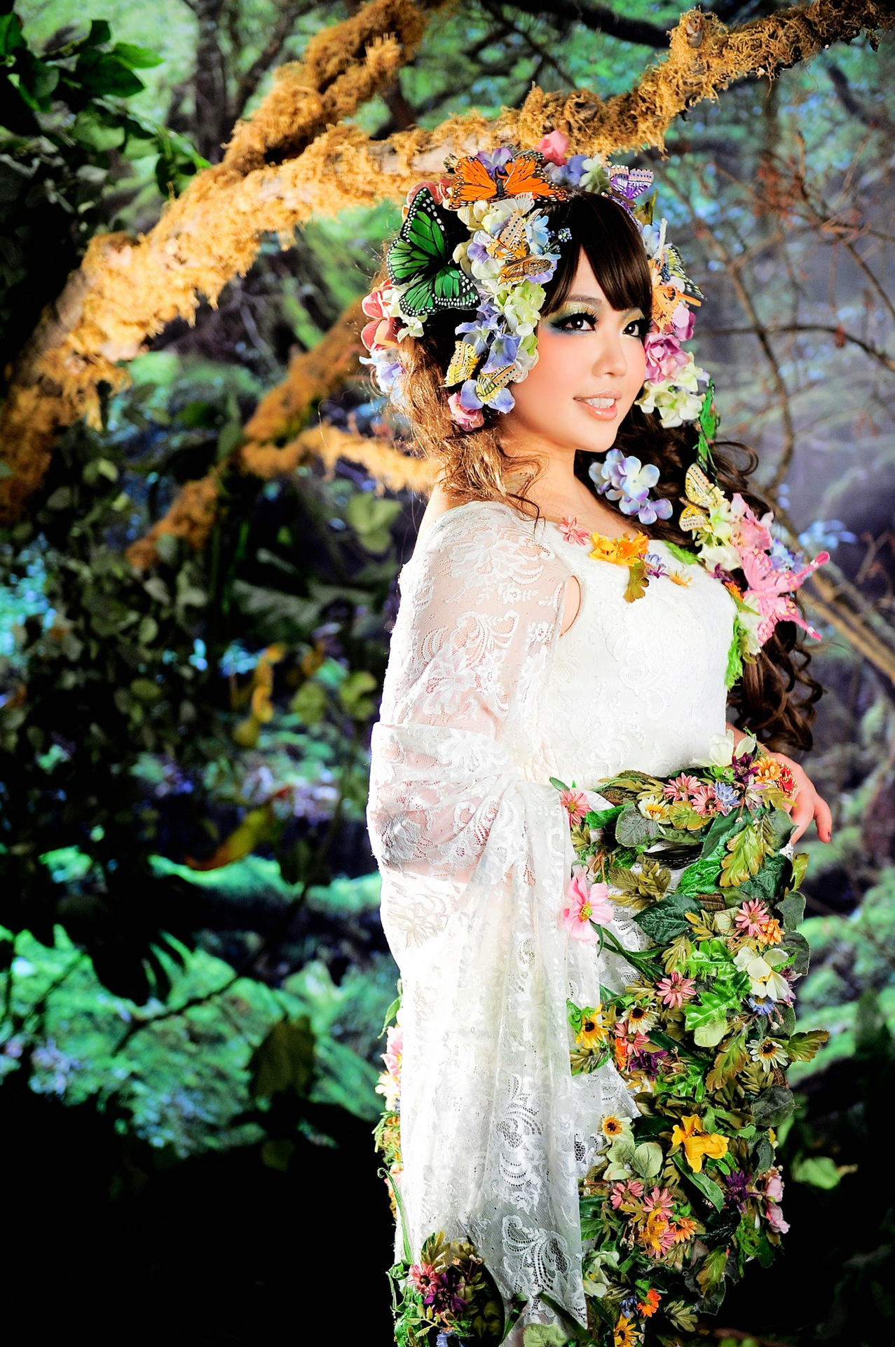 本人近影写真